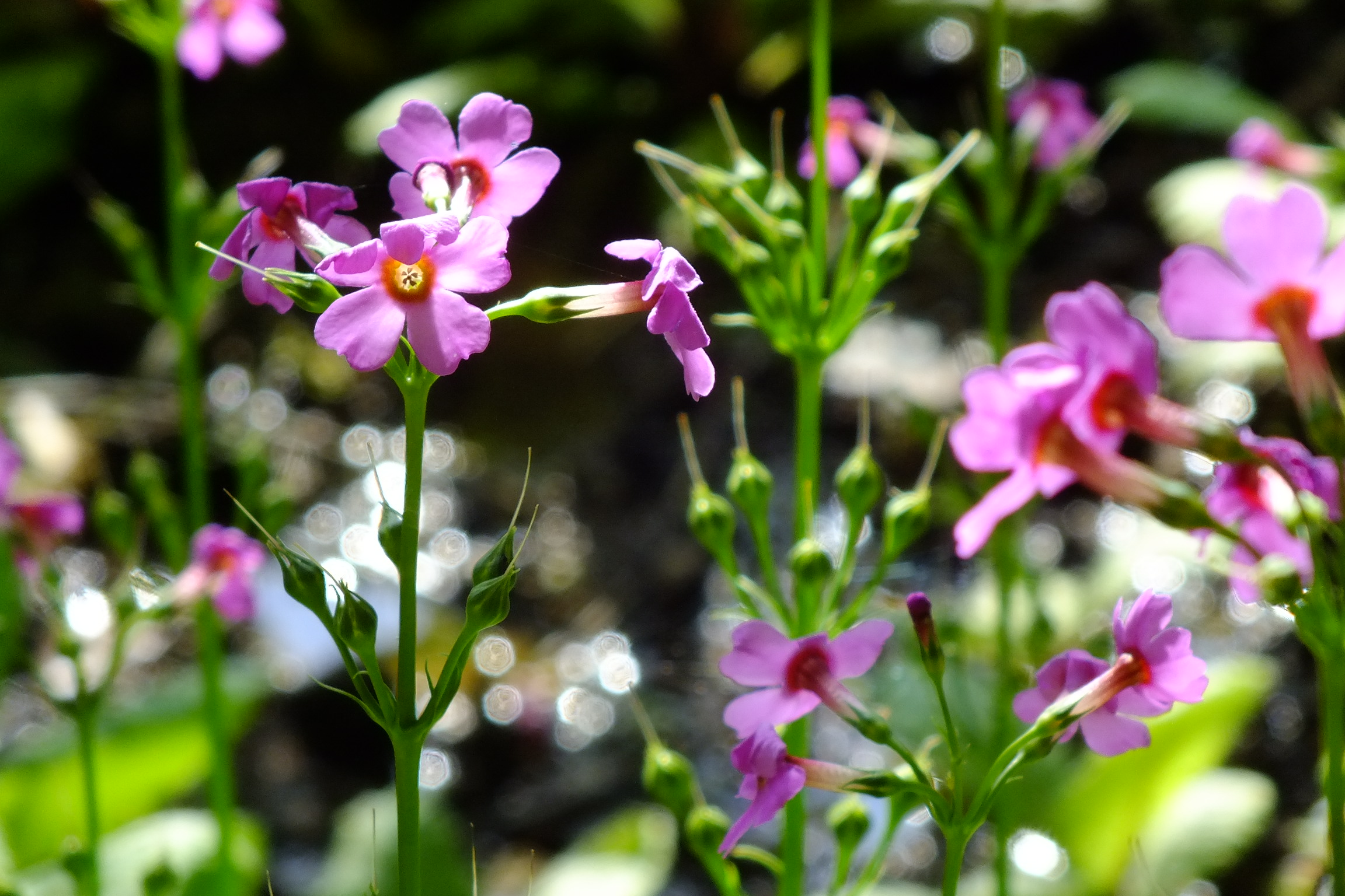 2016-05-17 Primula japonica in Mt.Mitke,Sasayama (クリンソウ,九輪草) 兵庫県篠山市 御嶽山麓